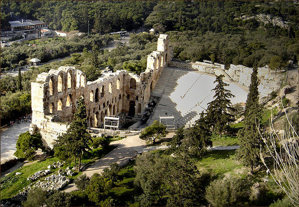 Odeon de Herodes, Atenas.